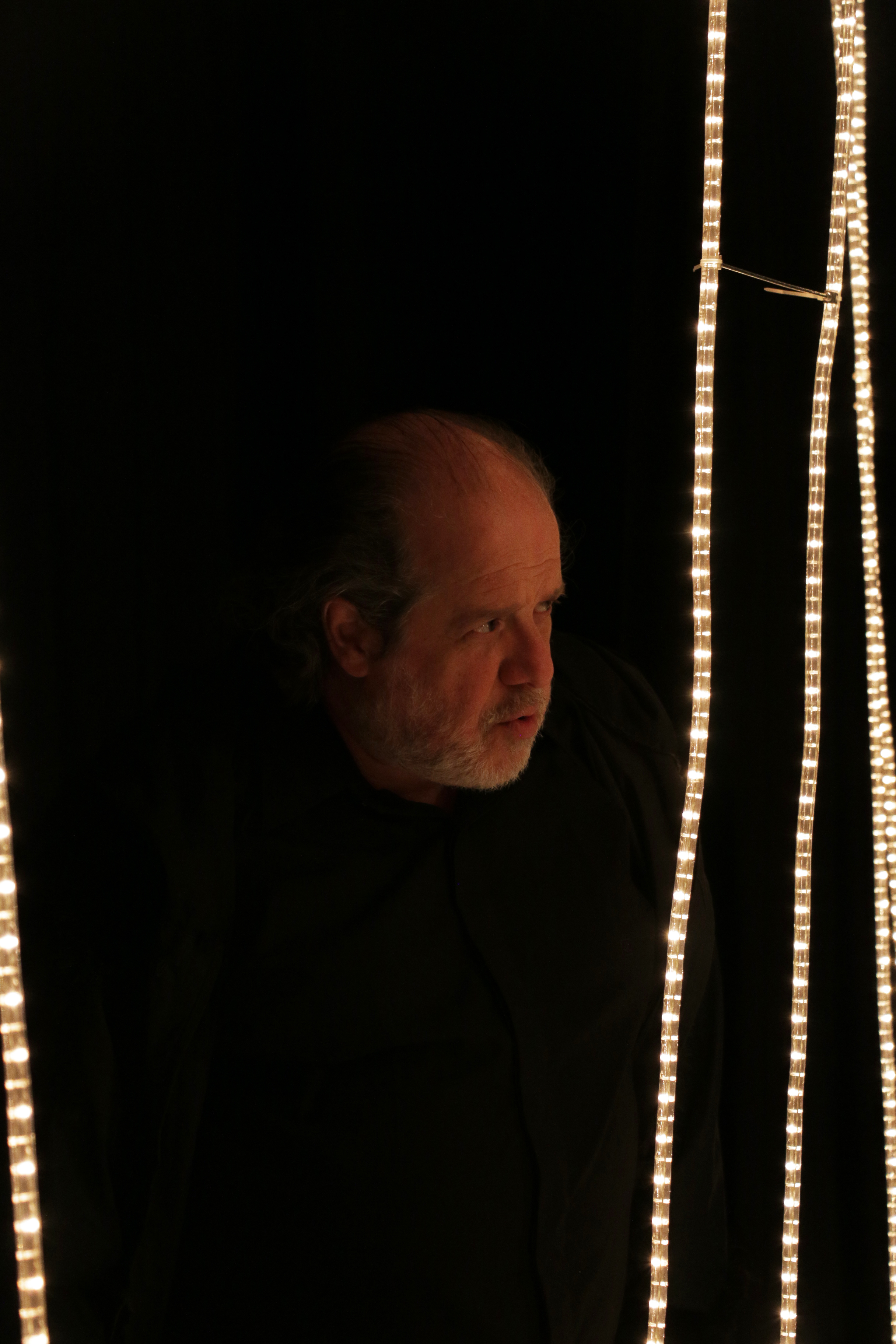 Espectáculo teatral sobre textos de William Shakespeare